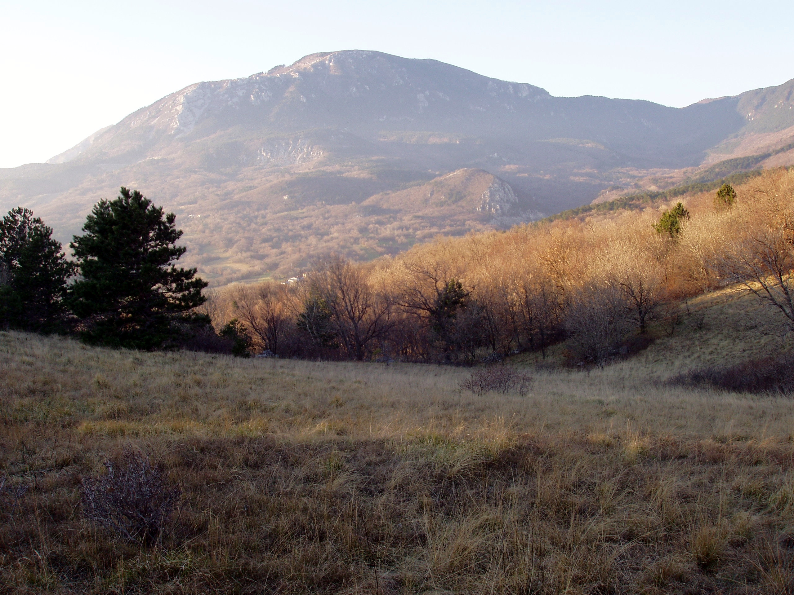 Čaven s Škola